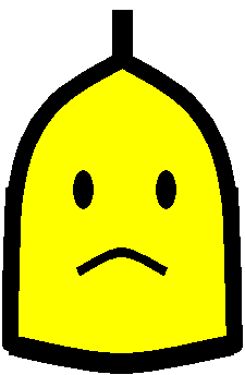 大韓民國首爾特別市鍾路區假區徽，由石添小草 04:26 2005年8月10日 (UTC)於04:26 2005年8月10日 (UTC)製作。源文件：